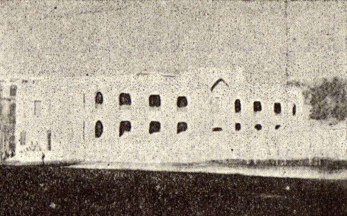 صورة خارجية لمبنى قصر السقاف، تاريخ الصورة غير معروف.